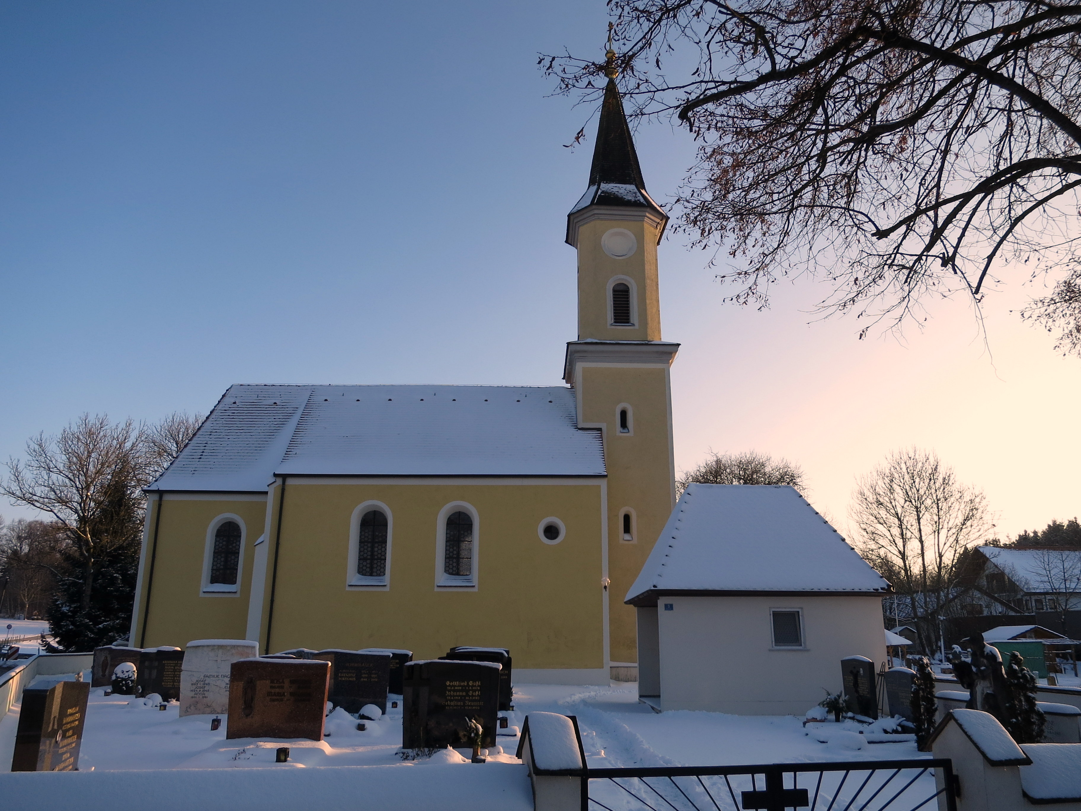 Die Filialkirche des Ortsteils Großnöbach im Januar